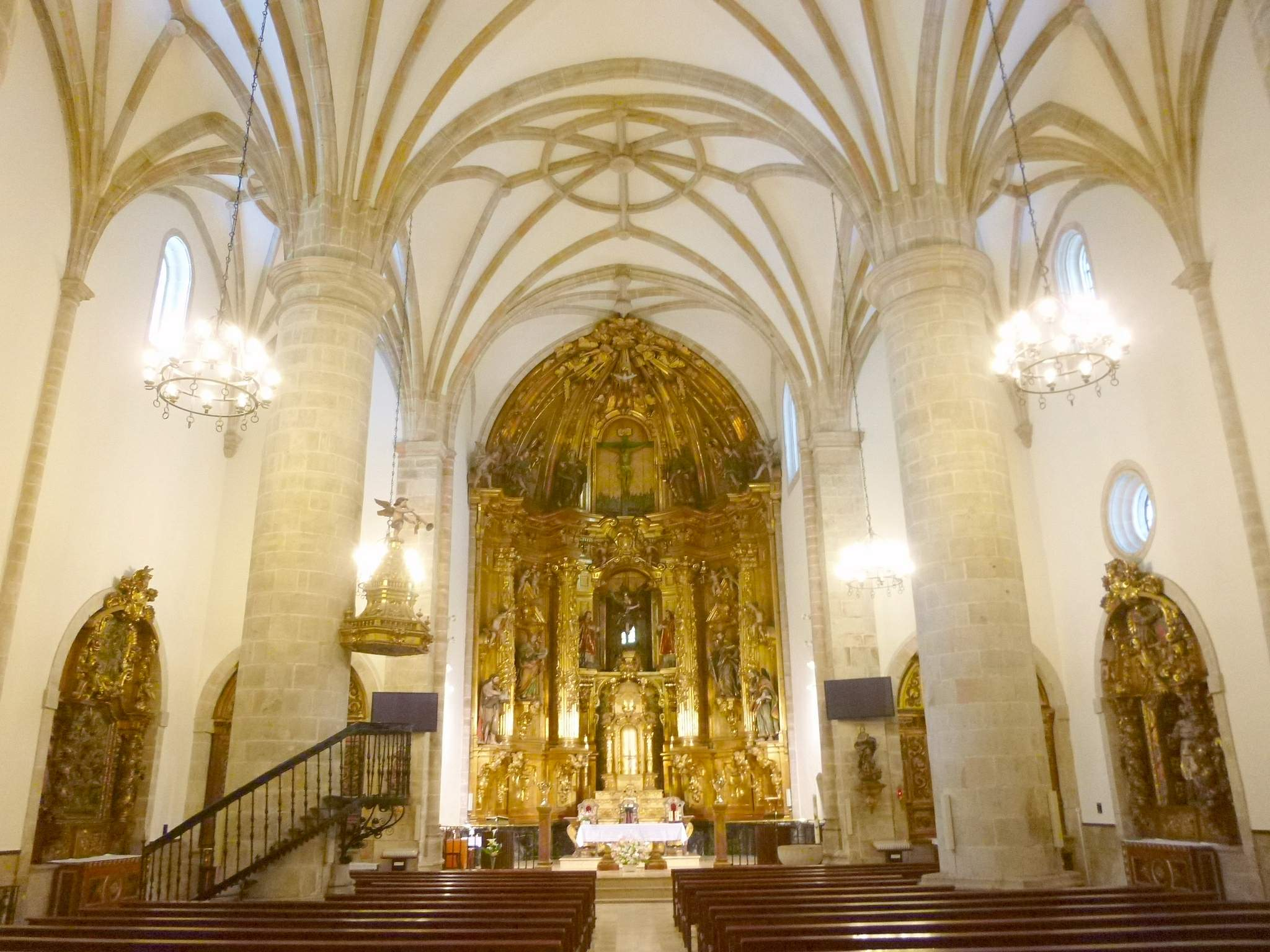 Iglesia del Señor San Miguel (Idiazabal, Gipuzkoa)